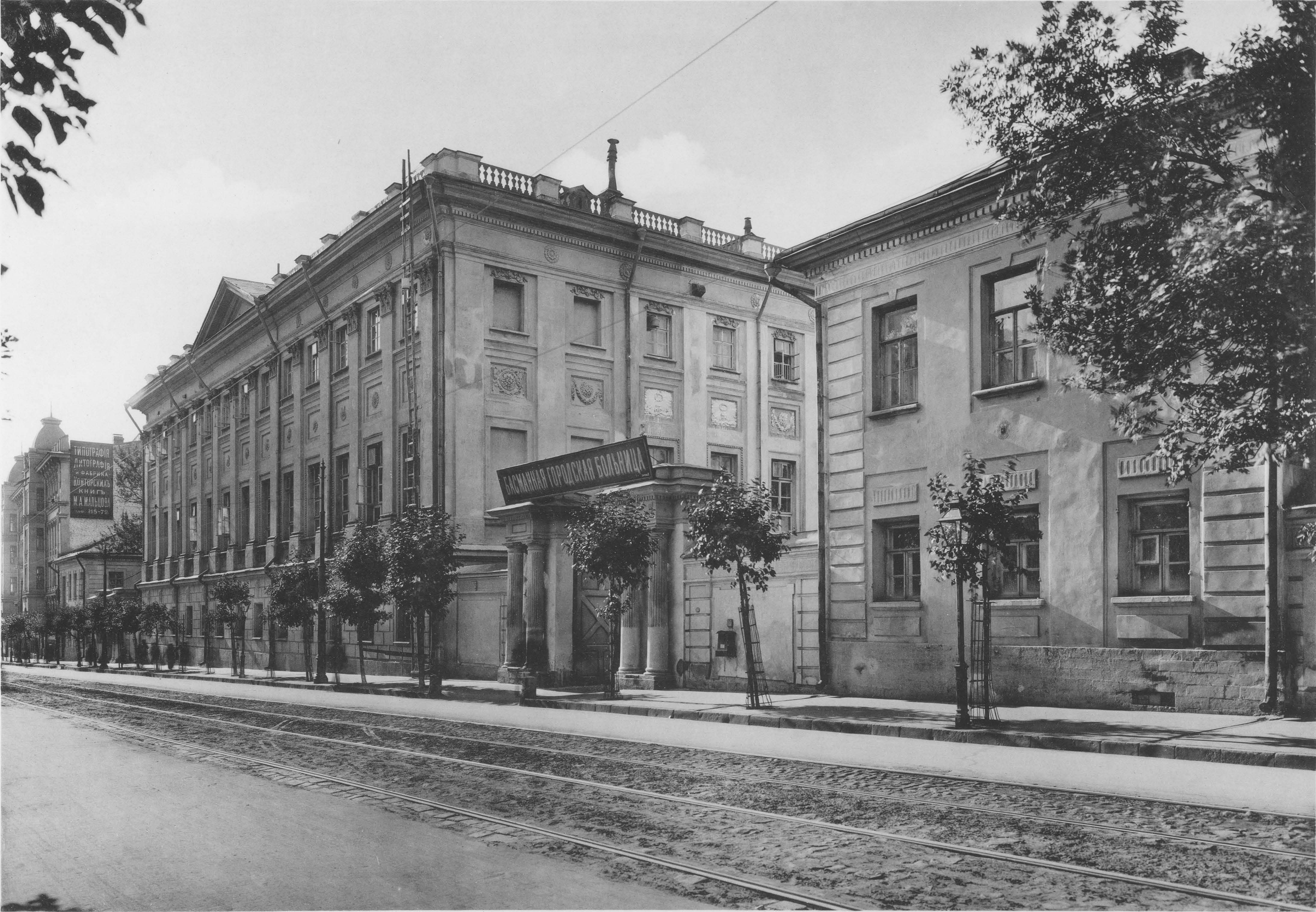 57. Басманная больница на Н.-Басманной ул. (Москва)